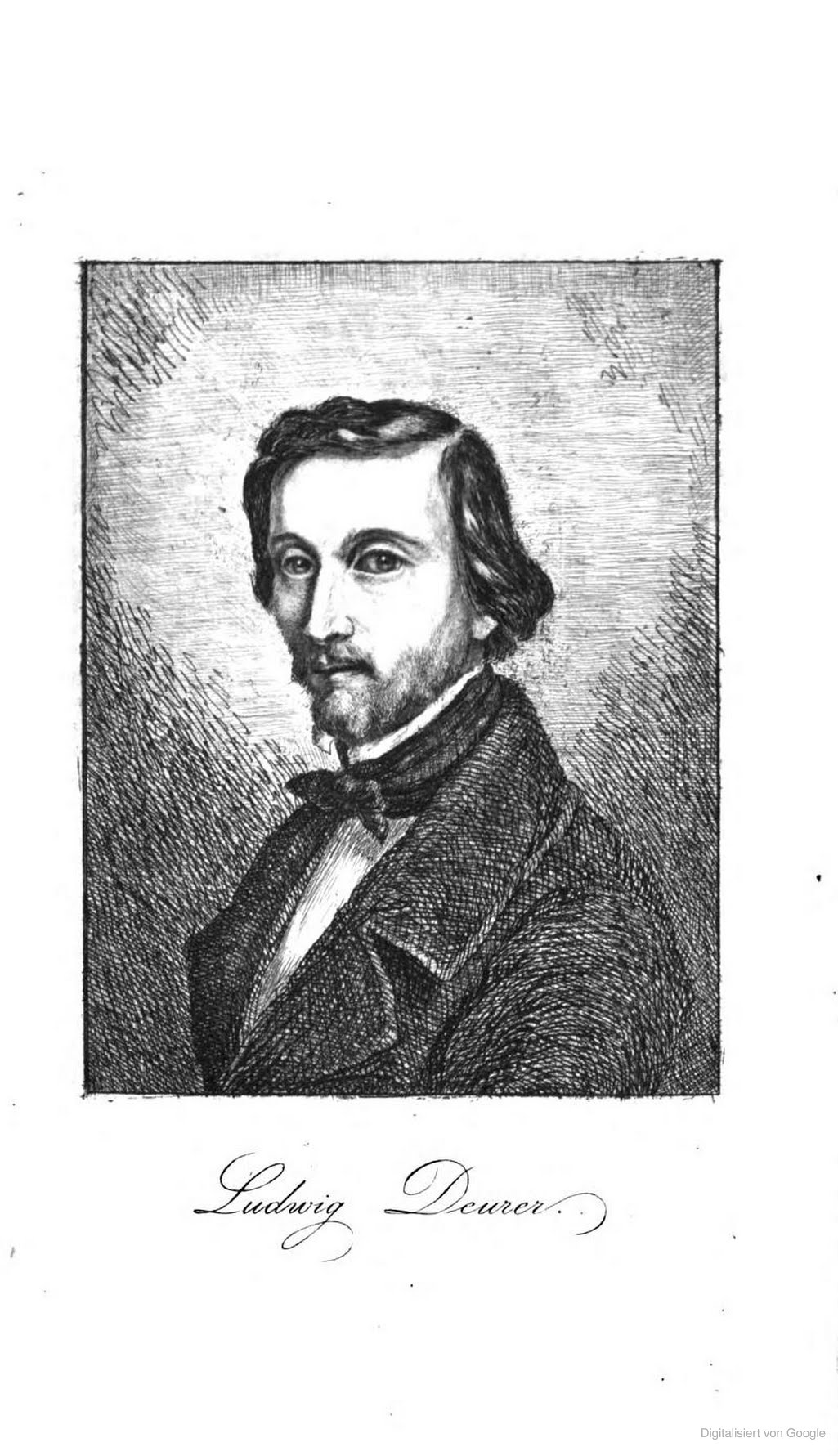 Ludwig Friedrich Deurer (* 16. Juli 1806 in Mannheim; † 30. Dezember 1847 Ebenda) war Historienmaler und Poststallmeister in Mannheim.